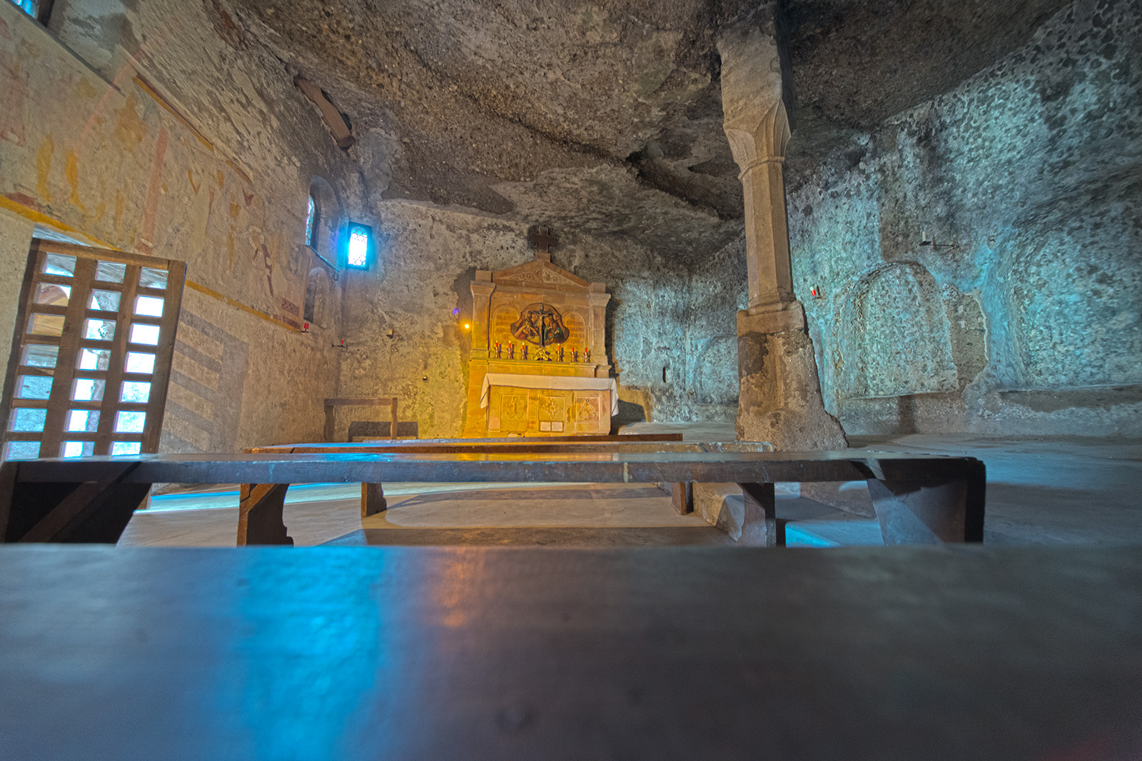 St Peter's Catacomb (HDR)